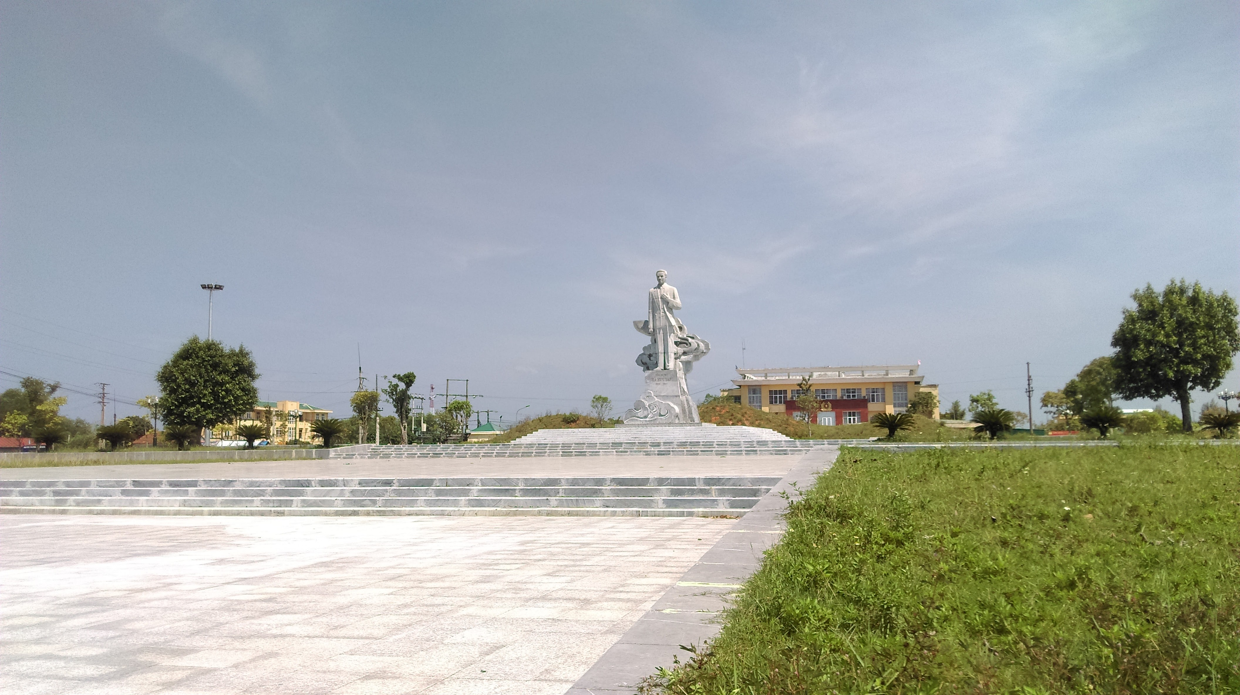 Quảng trường Hà Huy Tập, Cẩm Xuyên, Hà Tĩnh